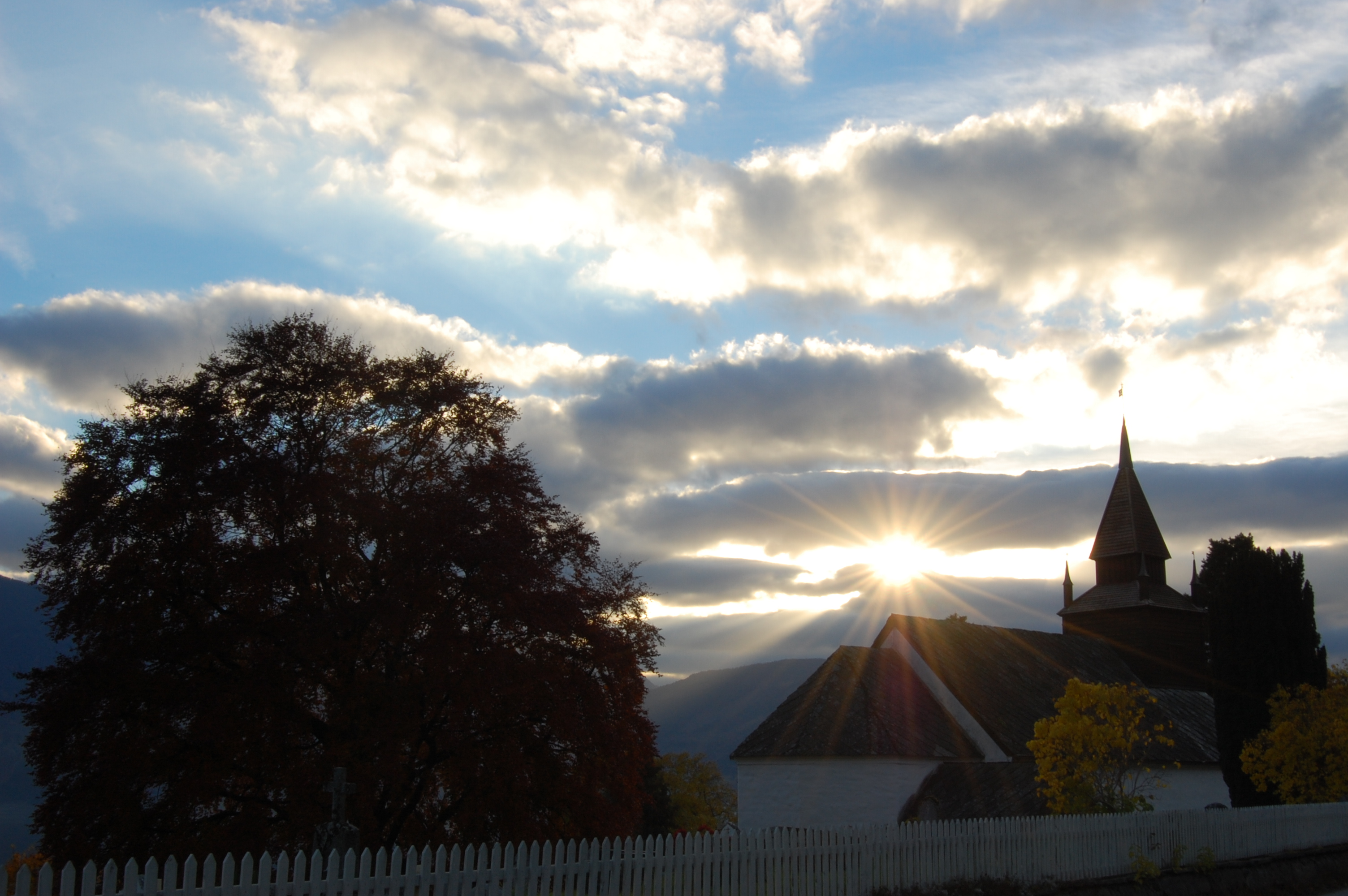 Leikanger kyrkje i Leikanger i Sogn